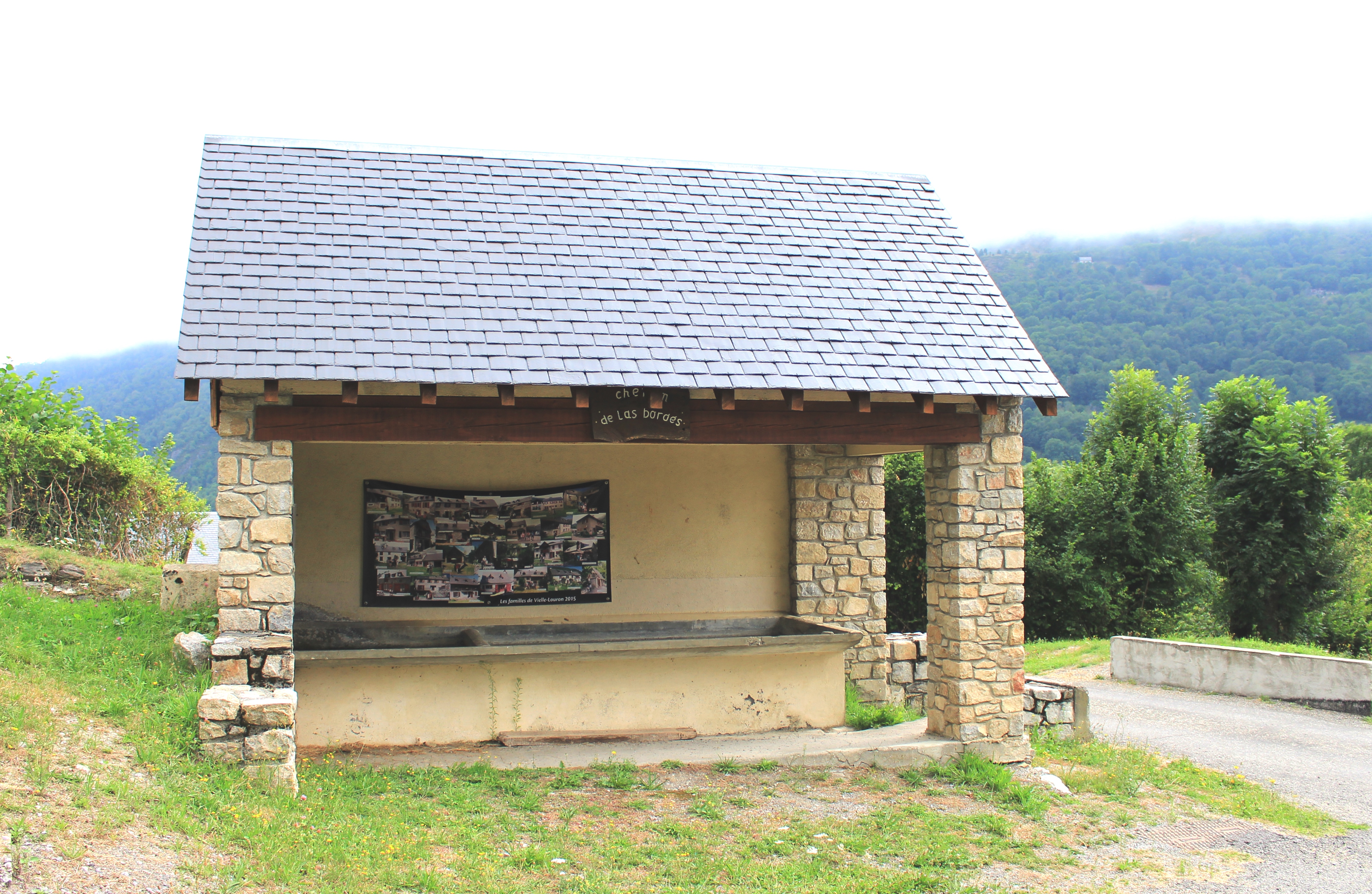 Lavoir de Vielle-Louron (Hautes-Pyrénées)